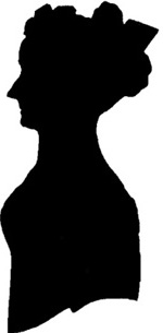 Scherenschnitt